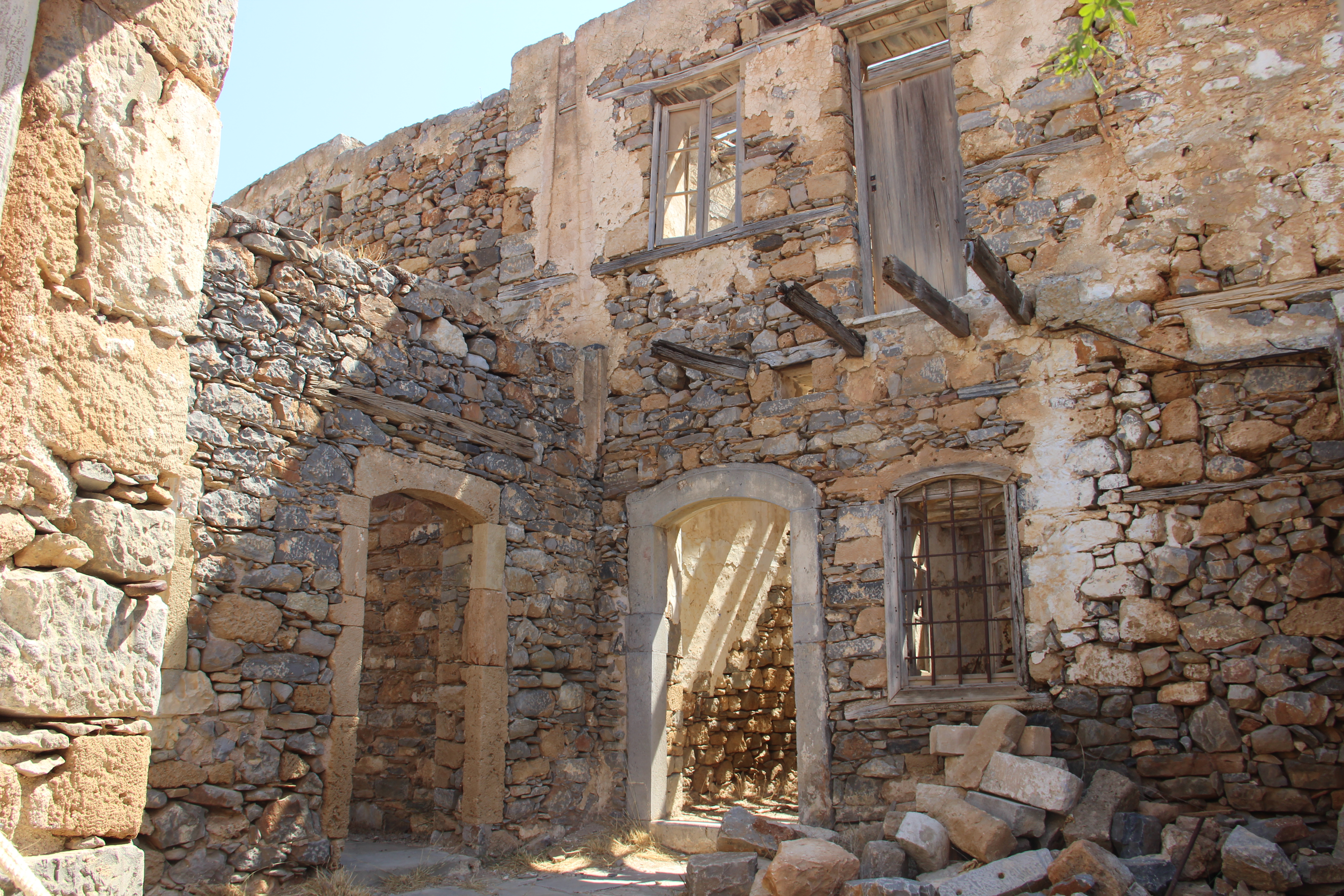 Внутренность дома. Очаг снаружи. Spinalonga. Lasithi. Crete. Greece. Июль 2013